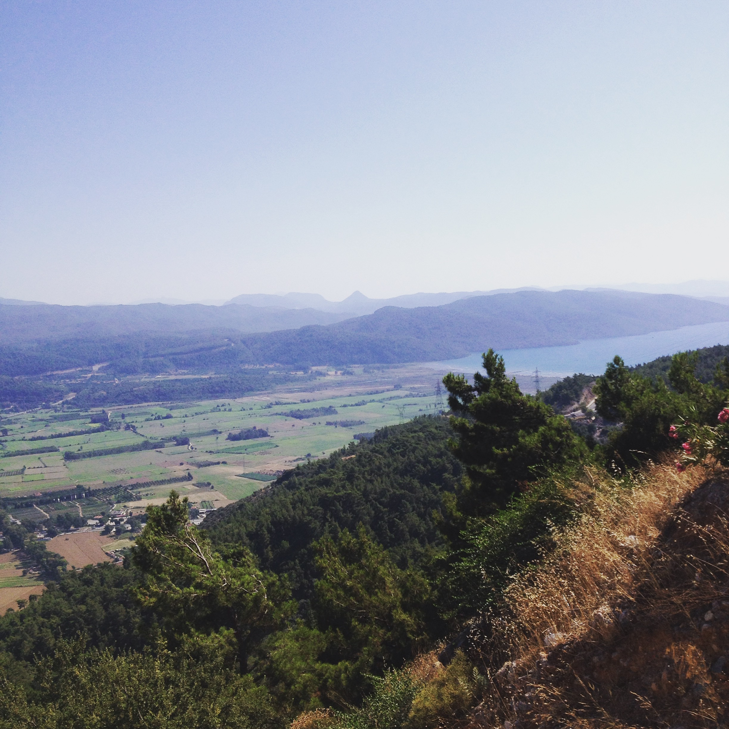 48660 Gökova/Ula/Muğla, Turkey